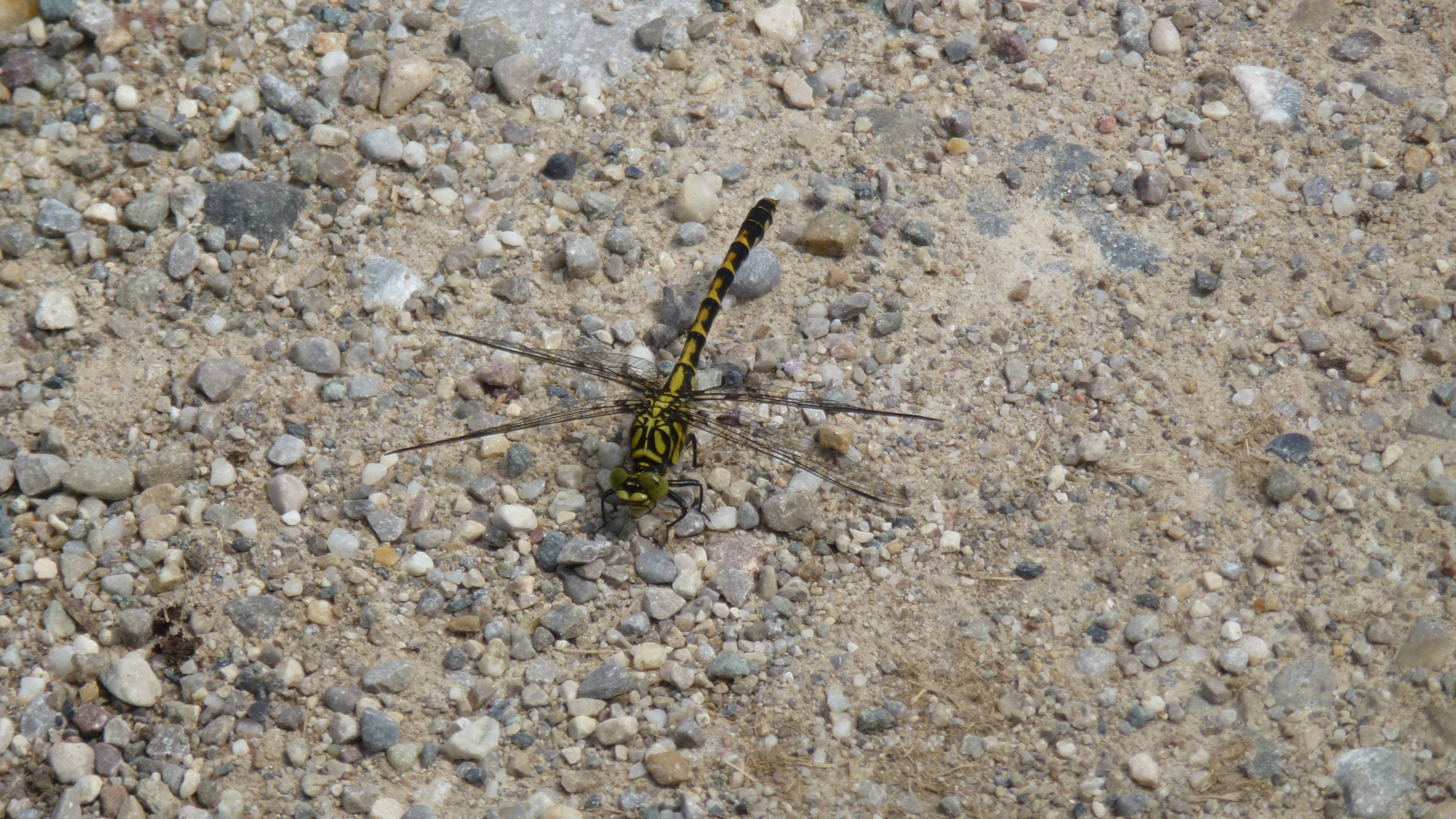 Kleine Zangenlibelle, Weibchen - Onychogomphus forcipatus. Aufgenommen in der Chiemgauer Seenplatte, irgendwo zwischen Stetten und Seeon, Bayern, Deutschland.